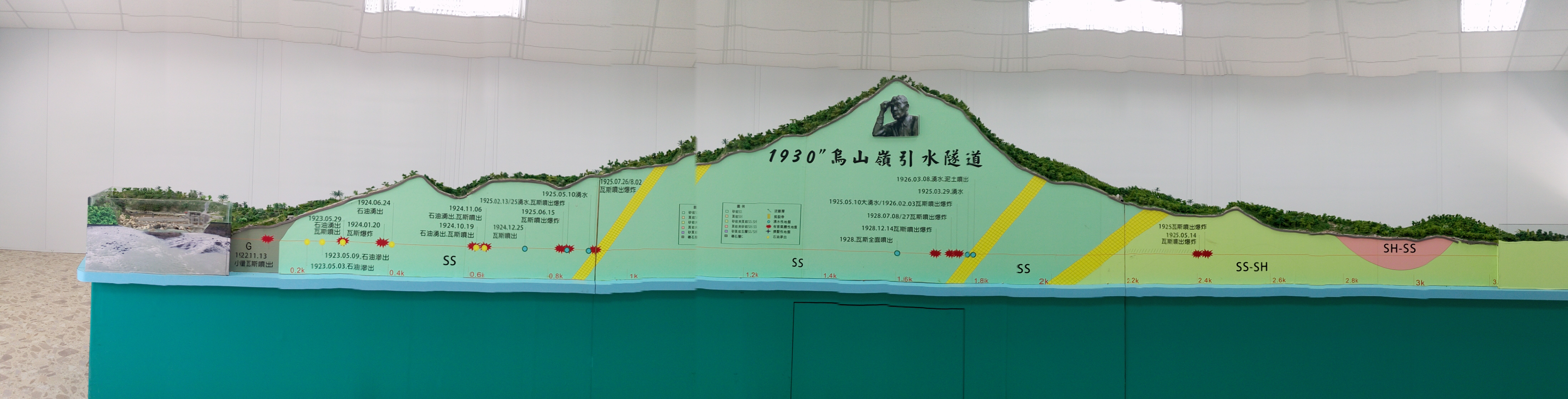 中文（台灣）: 烏山嶺引水隧道 舊線施工意外一覽